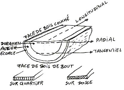 C'est un dessin que j'ai fait moi-même puis scanné et qui permet de comprendre le nom des différentes parties du bois selon la façon dont il est coupé Vahuge